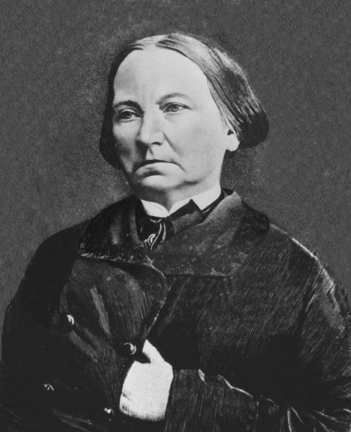 Fotografía de Concepción Arenal